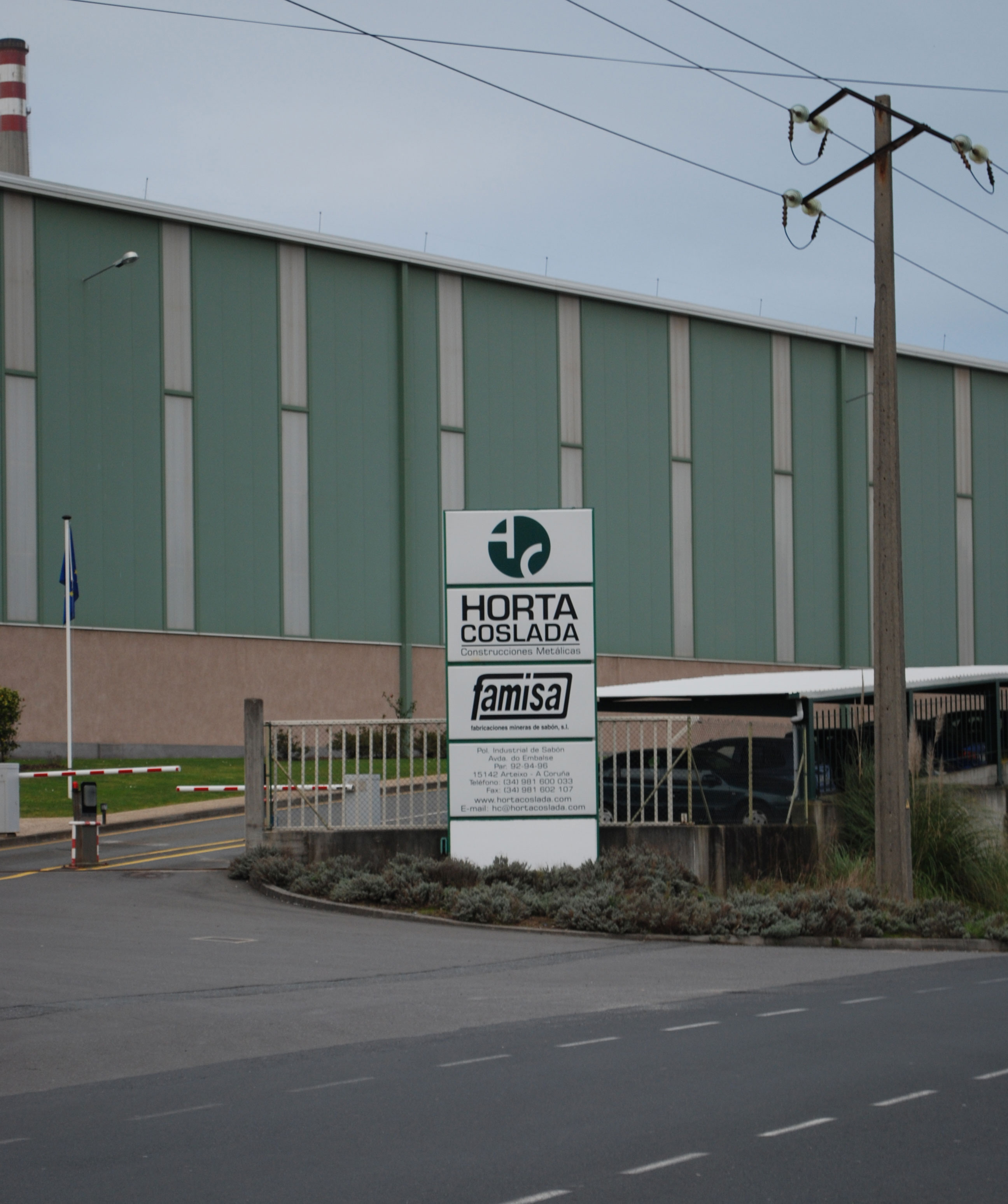 Empresa Horta Coslada polígono de Sabón Arteixo A Coruña Galiza Spain